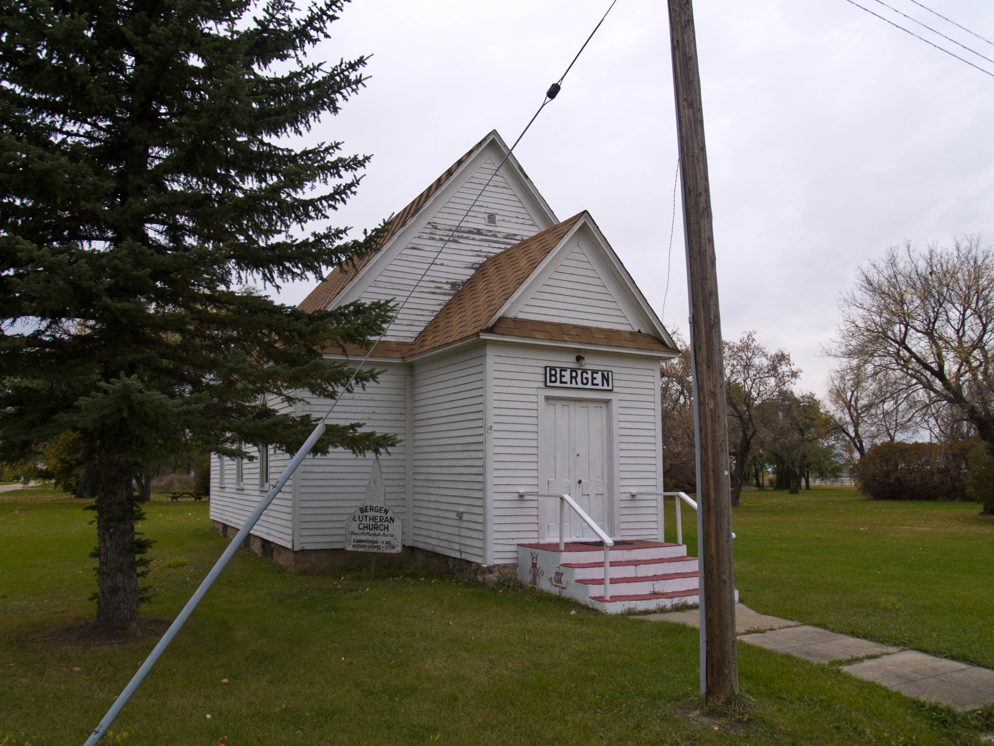 Bergen Lutheran Church - Bergen, North Dakota